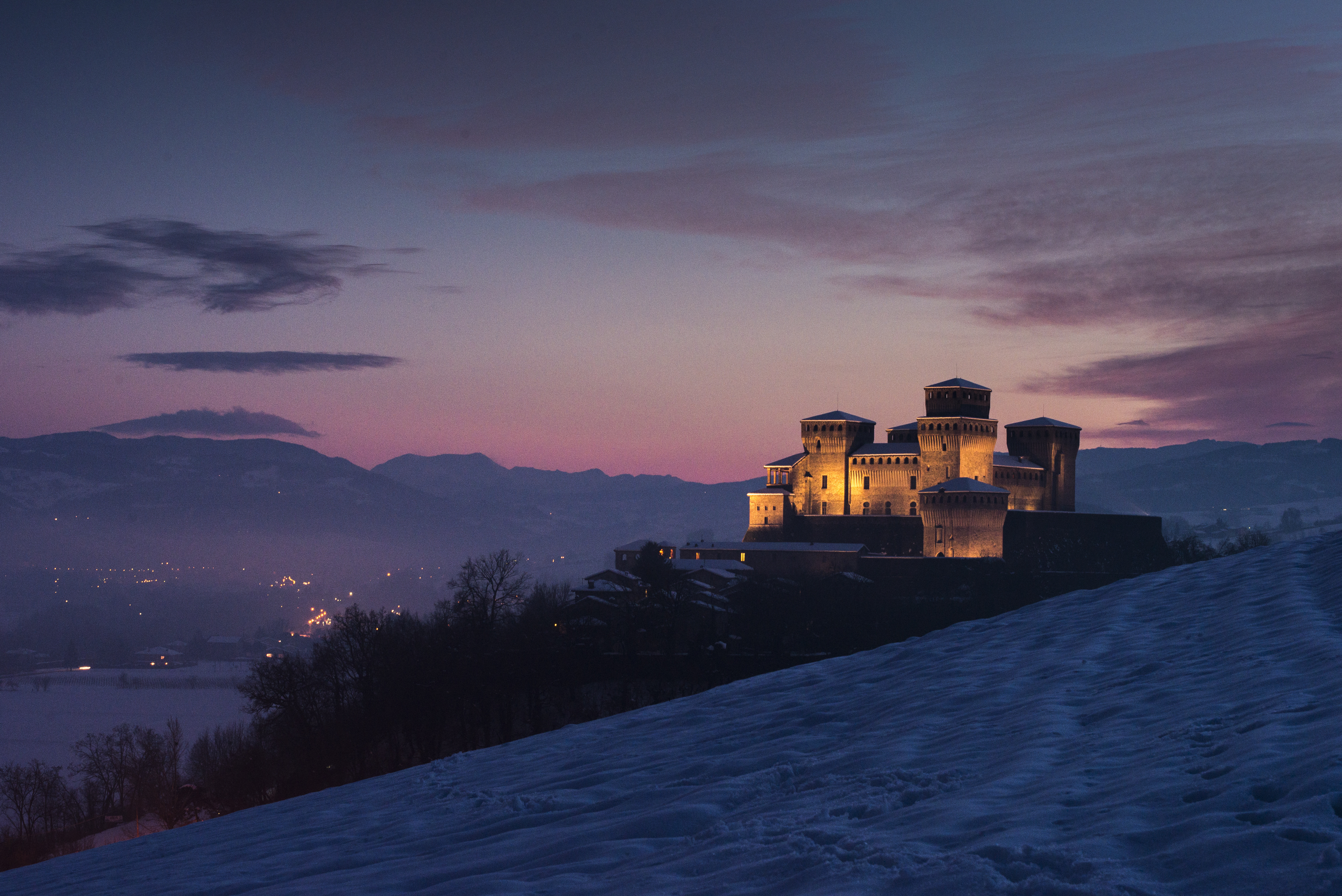 Castello di Torrechiara This is a photo of a monument which is part of cultural heritage of Italy.